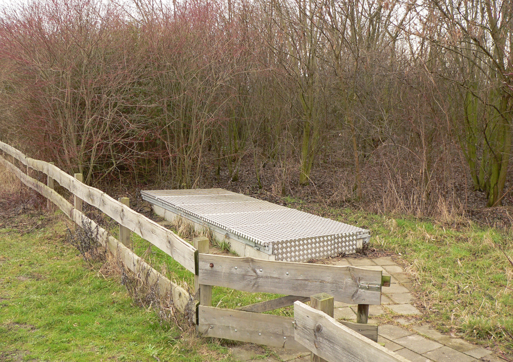 Abgedecktes Schwarzerde Profil in Asel